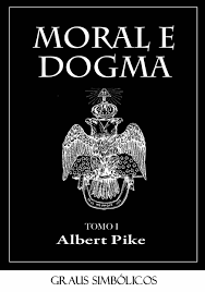 Capa do Livro MORAL E DOGMA